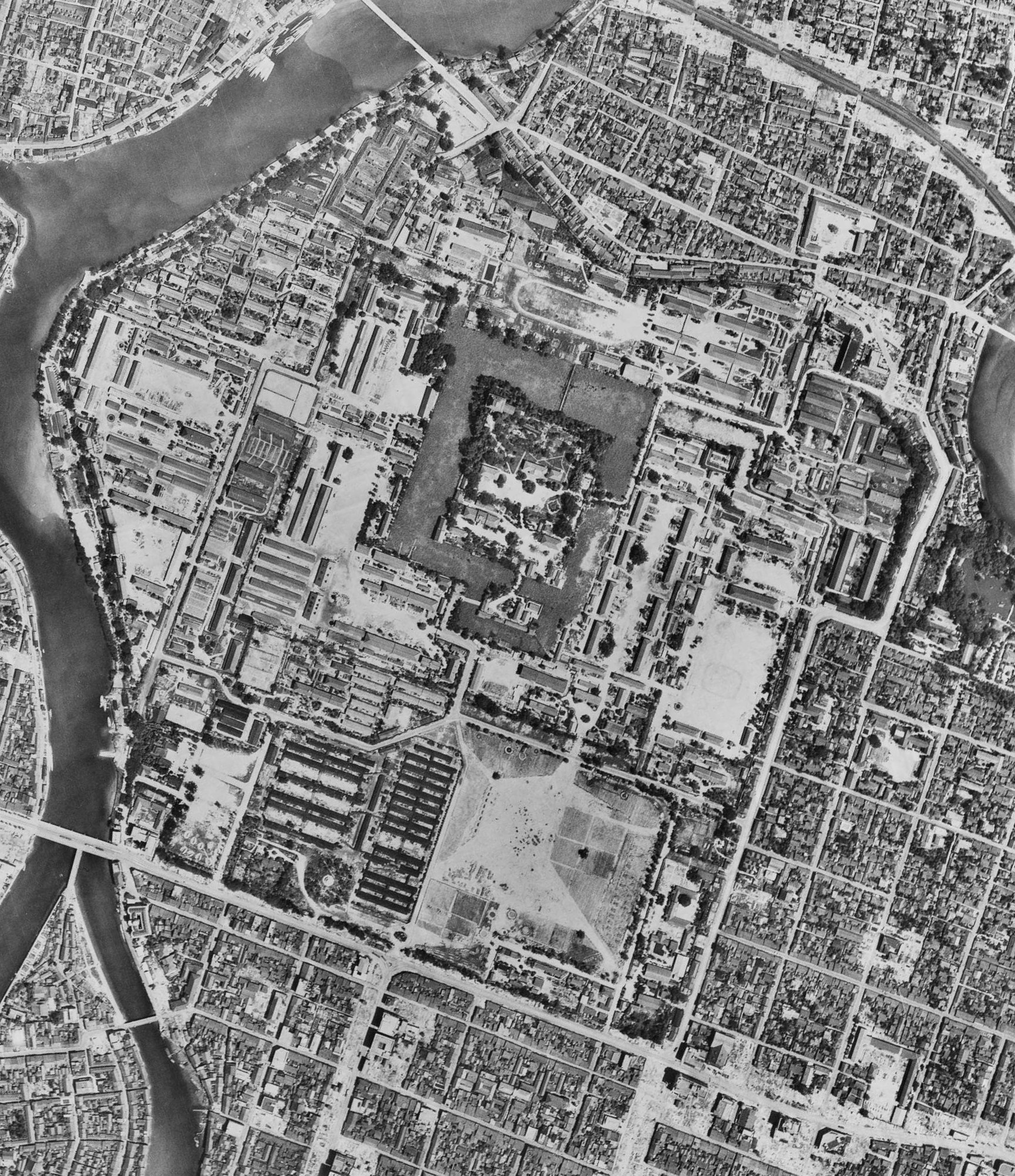 1945年7月25日広島市中区基町